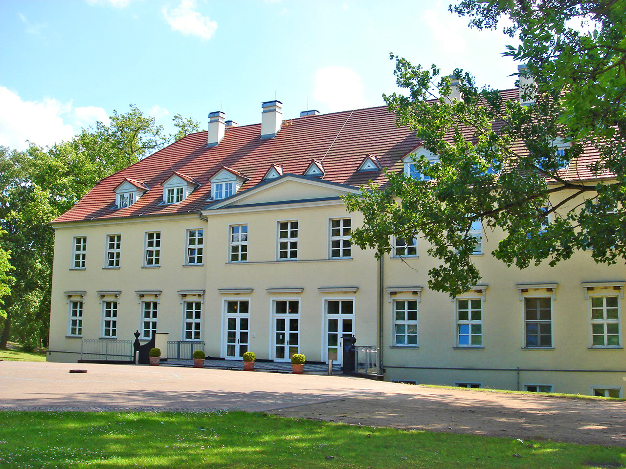 Schloss Rattey in Schönbeck nahe Neubrandenburg, Landkreis Mecklenburgische Seenplatte, Mecklenburg-Vorpommern. Das klassizistische Schloss von 1806 ist berühmt für die Weingüter ringsum. Geschichtl. Abriss: Im Jahr 1690 verlieh Gustav Adolf Herzog von Mecklenburg-Güstrow den Besitz an Georg-Henning von Oertzen. Die Familie konnte den Besitz aber erst ab 1775 nach dem Erlöschen der Familie Manteuffel im männlichen Stamm für sich nutzen. In diesem Jahr übernahm Victor-Wilhelm von Oertzen den Besitz. Sein Sohn, Hans-Christoph von Oertzen ließ 1806 das Herrenhaus, einen zweigeschossigen Putzbau im klassizistischen Stil, auf den Fundamenten eines älteren Gebäudes, errichten. Das Herrenhaus Rattey wurde zum Ende des 2. Weltkrieges durch die Familie von Oertzen an die Gemeinde verkauft. Die Familie verließ Mecklenburg nach dem gescheiterten Hitler-Attentat, an dem Hans-Ulrich von Oertzen maßgeblich beteiligt war. Nach dem Krieg zogen vorerst Flüchtlinge in das Gebäude ein, später wurden die Räume auch durch einen Kindergarten, die Post und die LPG-Küche genutzt. Im Jahr 1996 erwarben zwei Bremer Unternehmer das Herrenhaus und renovierten es von Grund auf. Seit 1998 wird hier ein Hotel geführt. Bekannt wurde Rattey auch als nördlichstes Weinanbaugebiet Deutschlands. Im Park stehen 13 Eichen, deren Alter auf mindestens 700 Jahre geschätzt wird. (s. gutshaeuser.de)